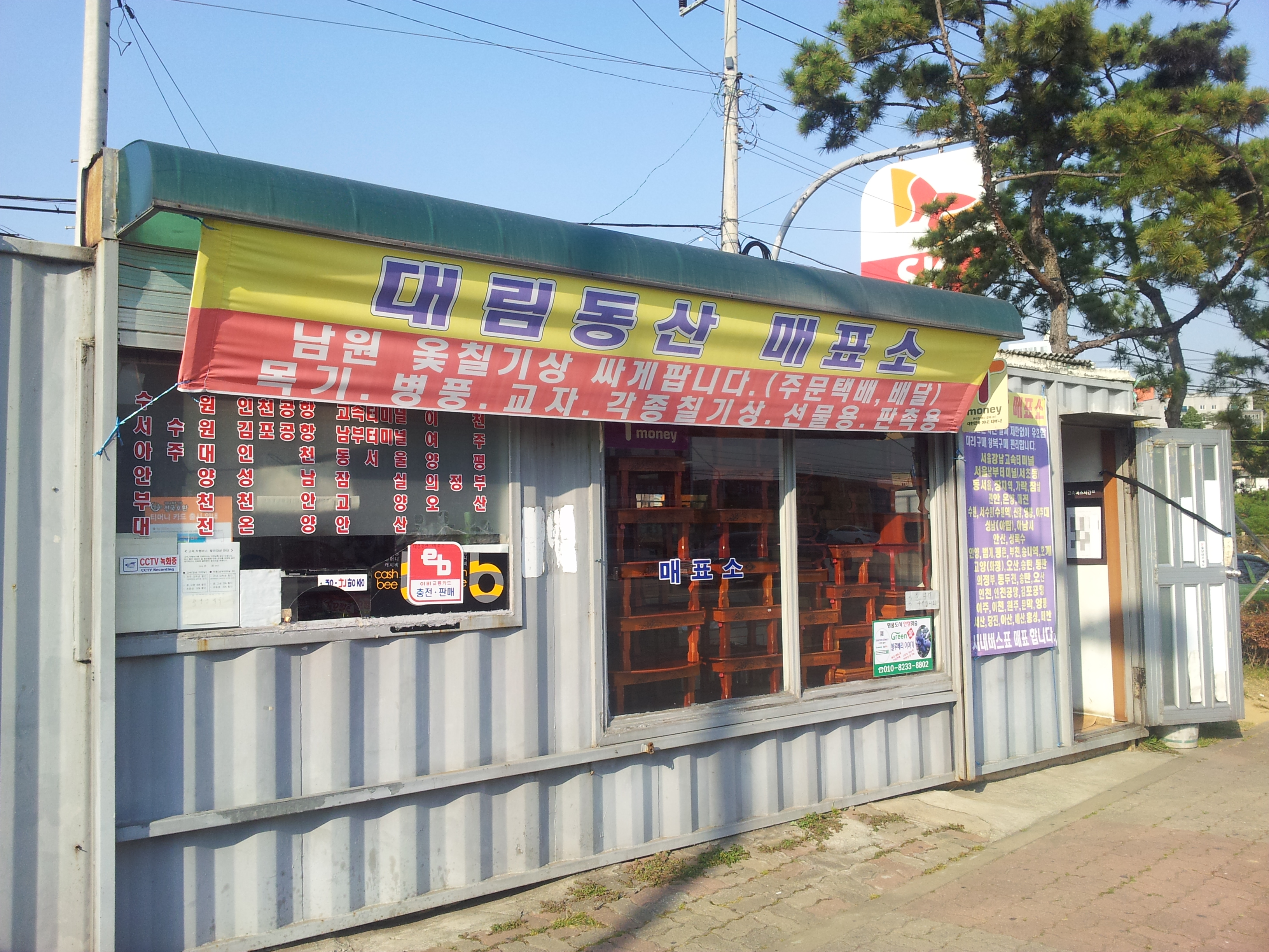 대림동산시외버스정류장